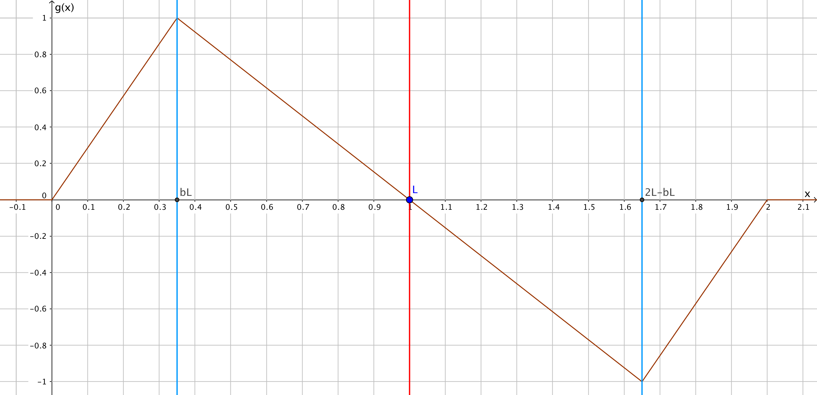 Gezupfte Saite Anfangswertproblem